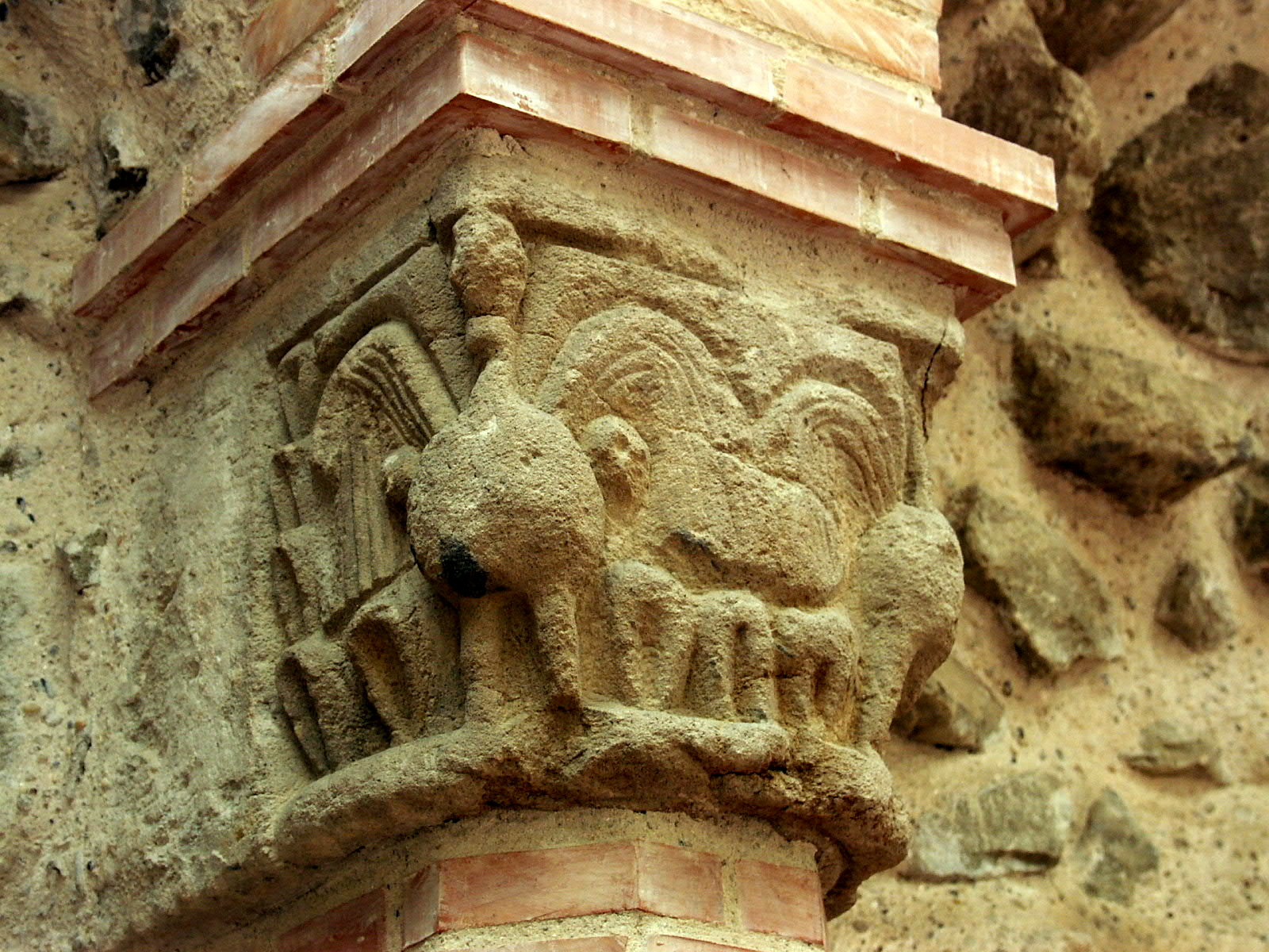 prépostsági romok This is a photo of a monument in Hungary. Identifier: 6144